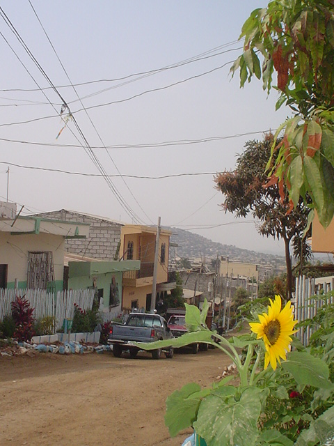 ZUMAR - Bastión Popular - Barrio mejorado por sus moradores. Autor: Equipo ZUMAR Fecha: diciembre 2005